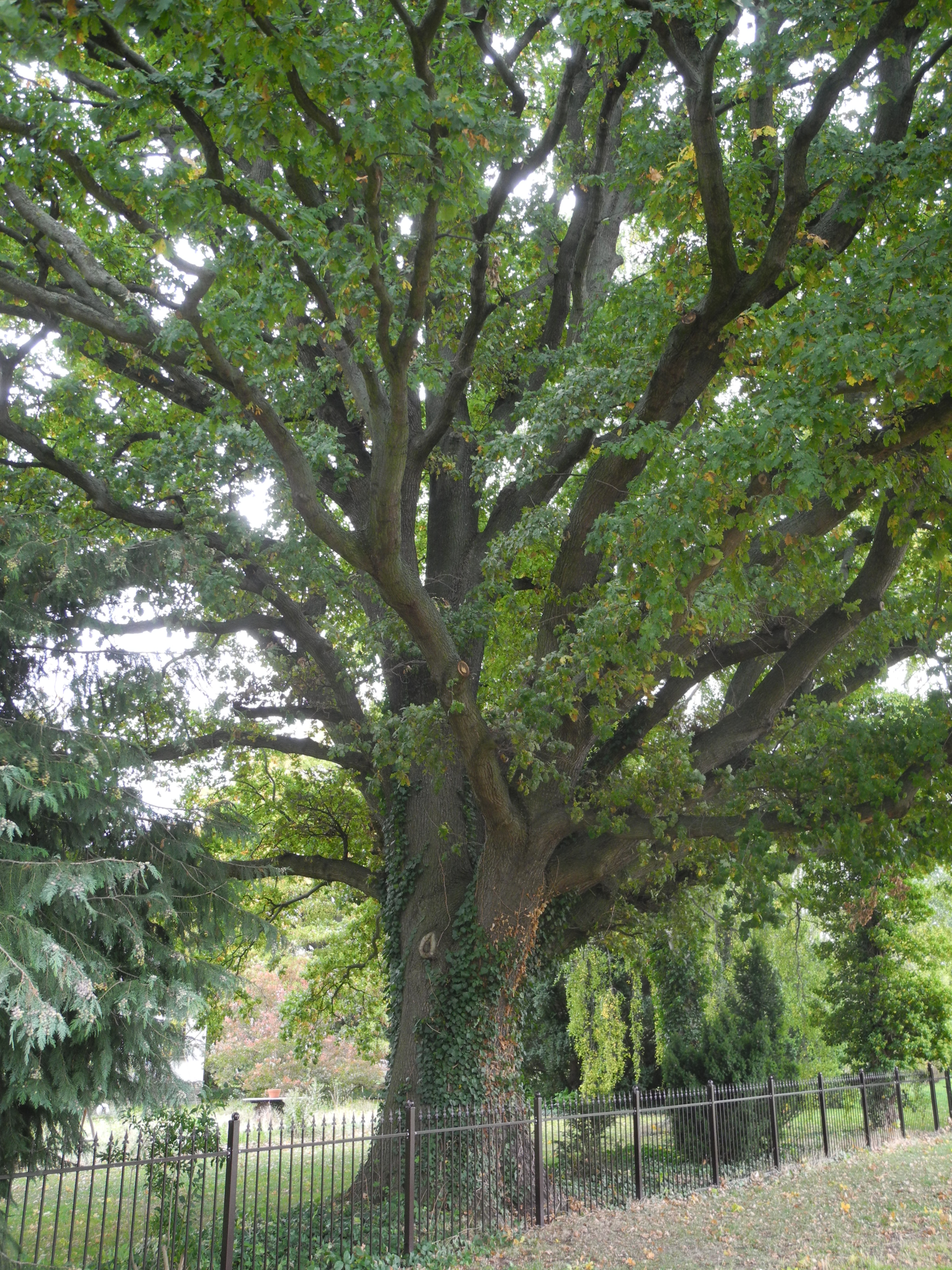 Naturdenkmal in Kassel 611.096. "1 Stieleiche" (Quercus robur) - Kasseler Straße, südlich der Haus Nr. 28 a, nördlich der A 49.